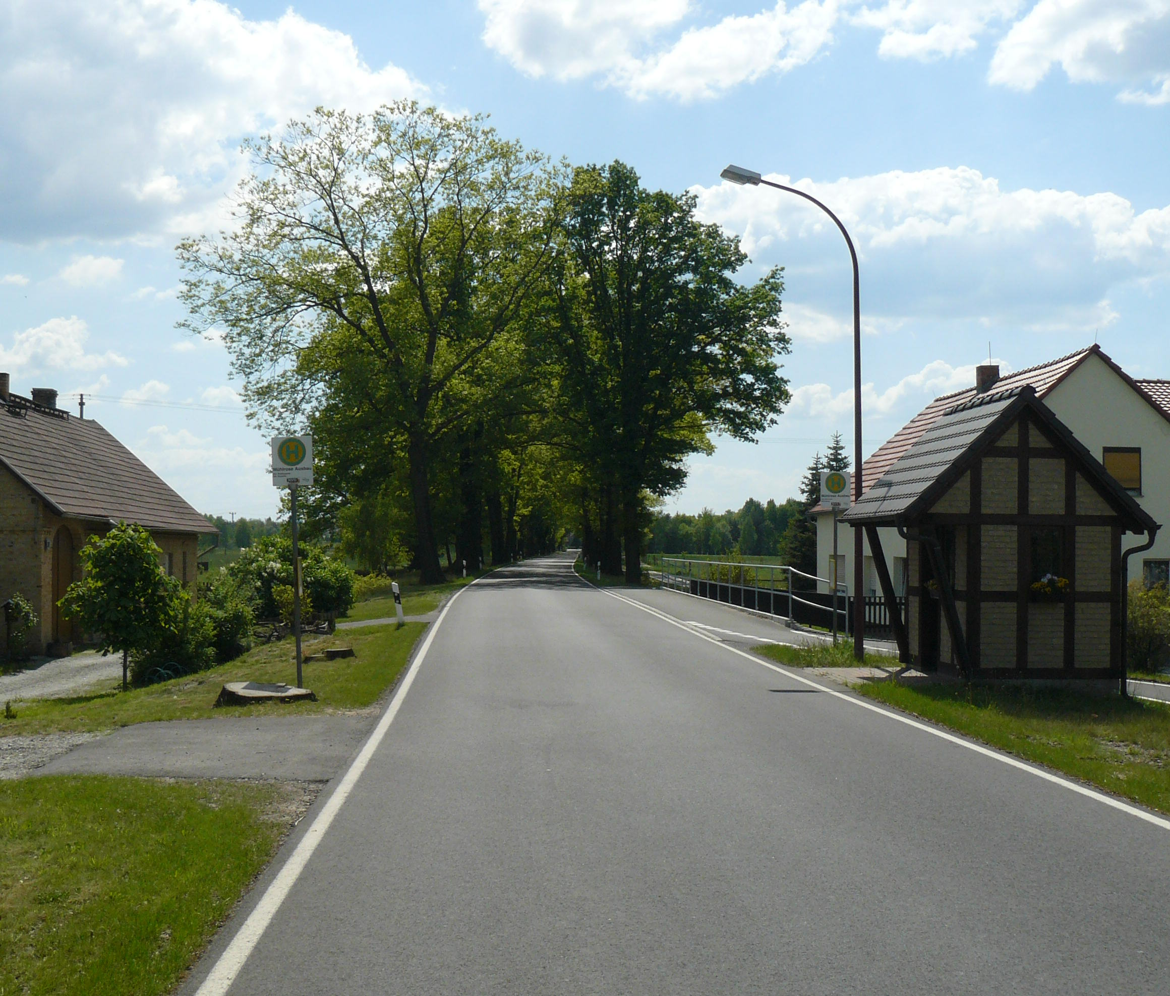 Mühlrose in Sachsen: Blick vom Ortsteil Ausbau in Richtung des Dorfes. Map: 51° 30′ N, 14° 31′ E